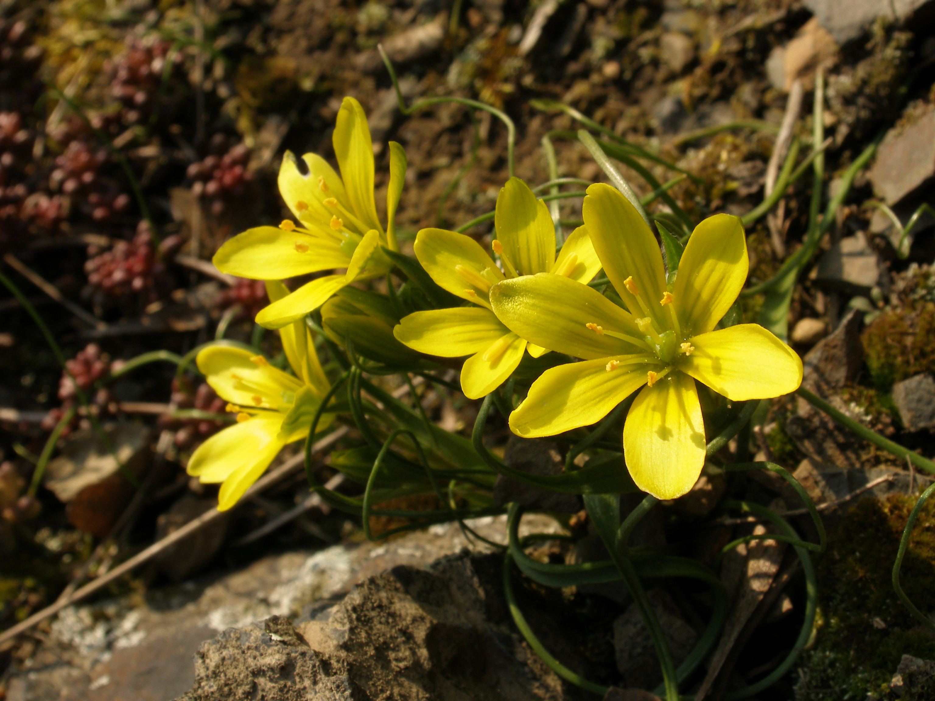 Nad Mlýnem (přírodní památka) - brzké jaro - Gagea bohemica (Zauschner) J. A. Schultes et J. H. Schultes subsp. bohemica, křivatec český pravý - status ohrožení v ČR: C2 (silně ohrožený)